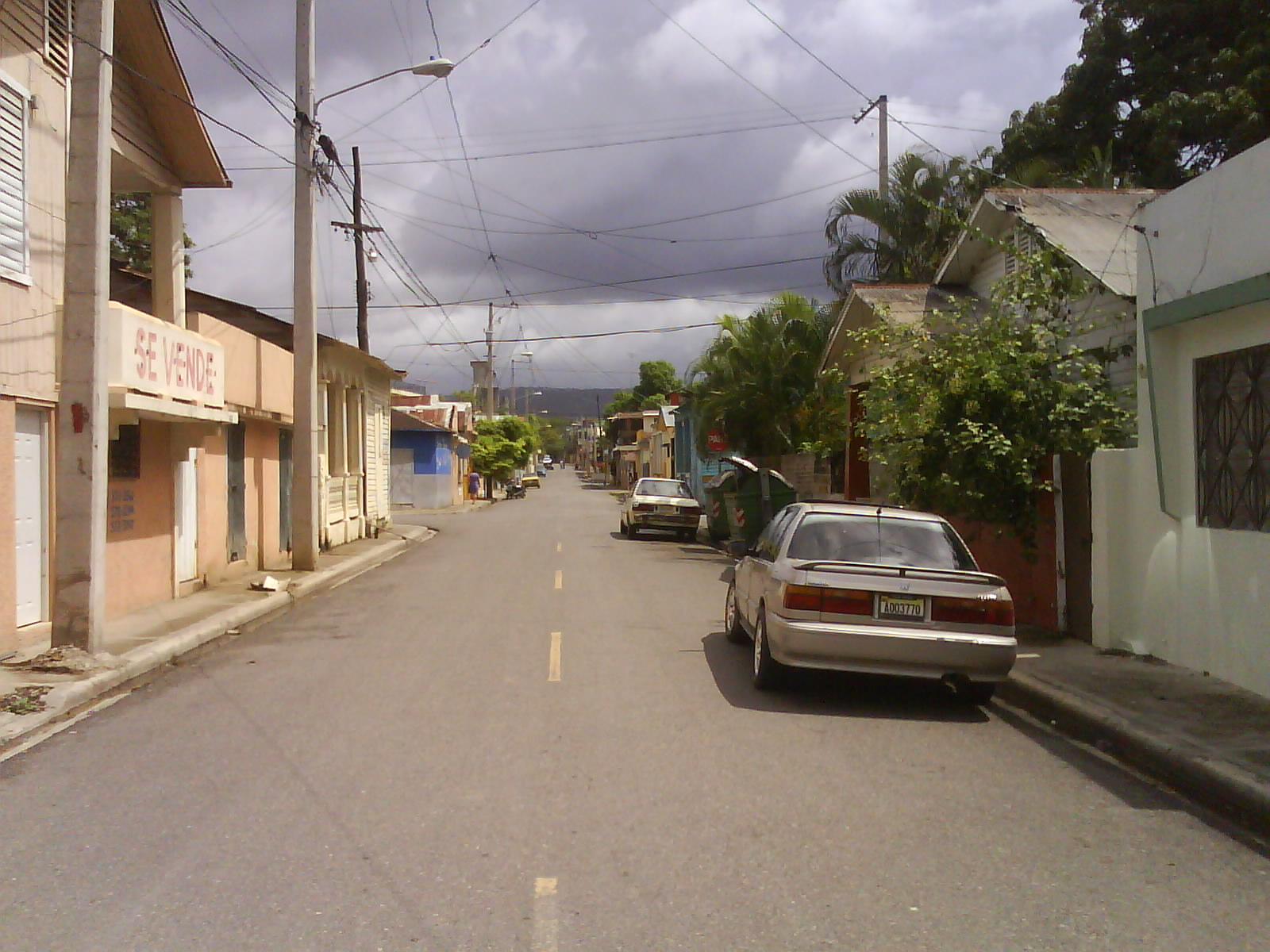 Sector del Parque Hostos.